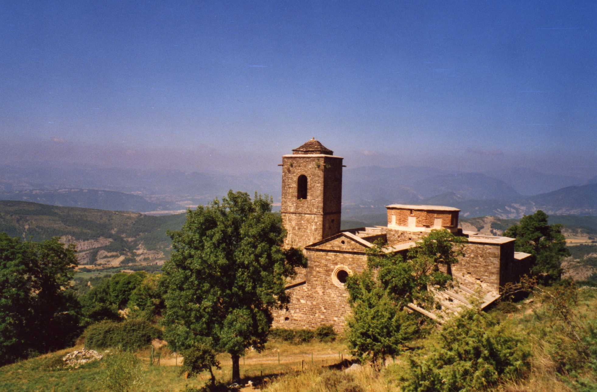 Vista general del hoy Real Monasterio de San Victorián, en verano del año 2000, antes de que se planease siquiera su restauración. Como se puede ver, se encontraba completamente en ruinas. Hoy en día, se ha iniciado un lento proceso de restauración por el cual se han restituido una serie de cubiertas provisionales a modo de tejado para proteger el interior y detener el acelerado proceso de degradación que sufría. Nuevas aportaciones tardarán en verse.